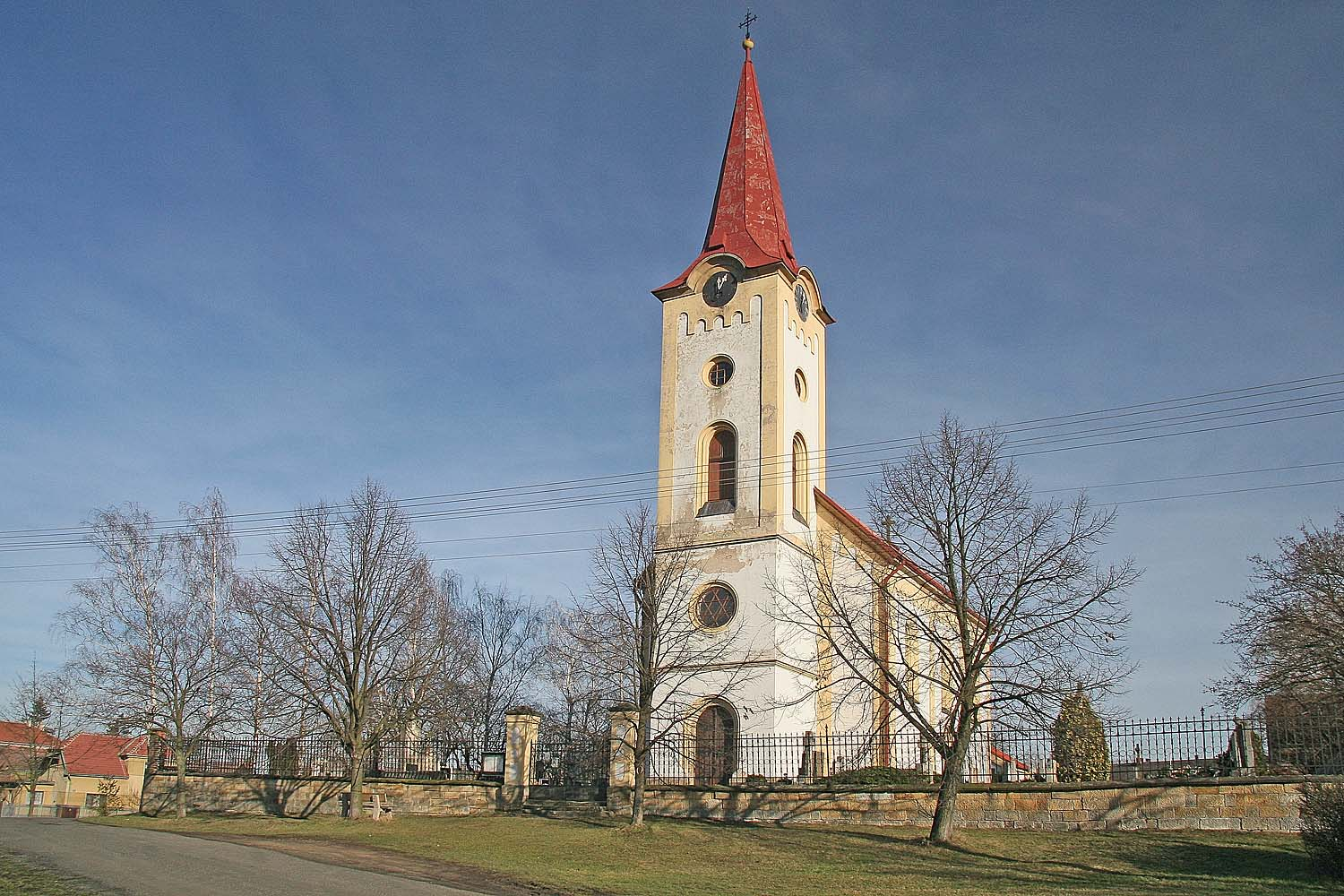 Kostel Svatého Martina v Slovči. District Nymburk autor:Prazak date: 15. 1. 2007